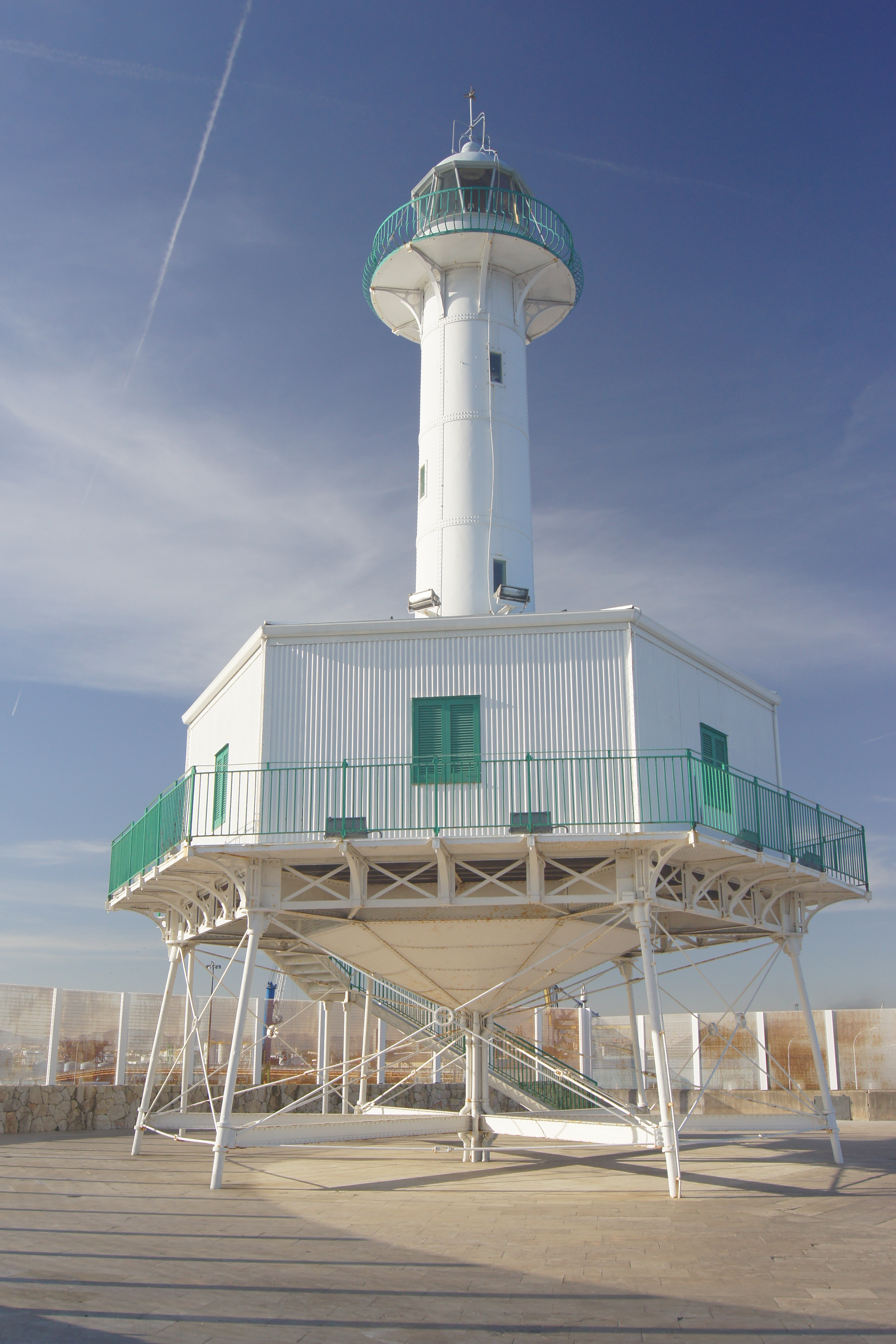 Faro de la Banya, Tarragona, España. Este faro de estructura metálica fue construido a finales del siglo XIX y puesto en servicio en el Delta del Ebro. Tras ser desacivado fue trasladado al Dique de Levante del puerto de Tarragona y puesto de nuevo en servicio en 1990. La Banya Lighthouse, Tarragona, Spain. (Tarragona Dique de Levante) This metallic structure lighthouse was built at the end of XIX century and installed in River Ebro delta. It was discontinued and moved to Tarragona harbour and relit in 1990.